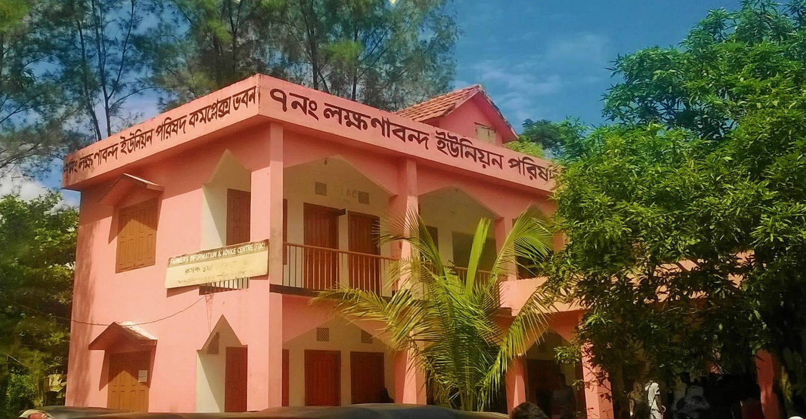 বাংলাদেশের সিলেট জেলার গোলাপগঞ্জ উপজেলার ঐতিহ্যবাহী একটি ইউনিয়ন পরিষদ ভবন।